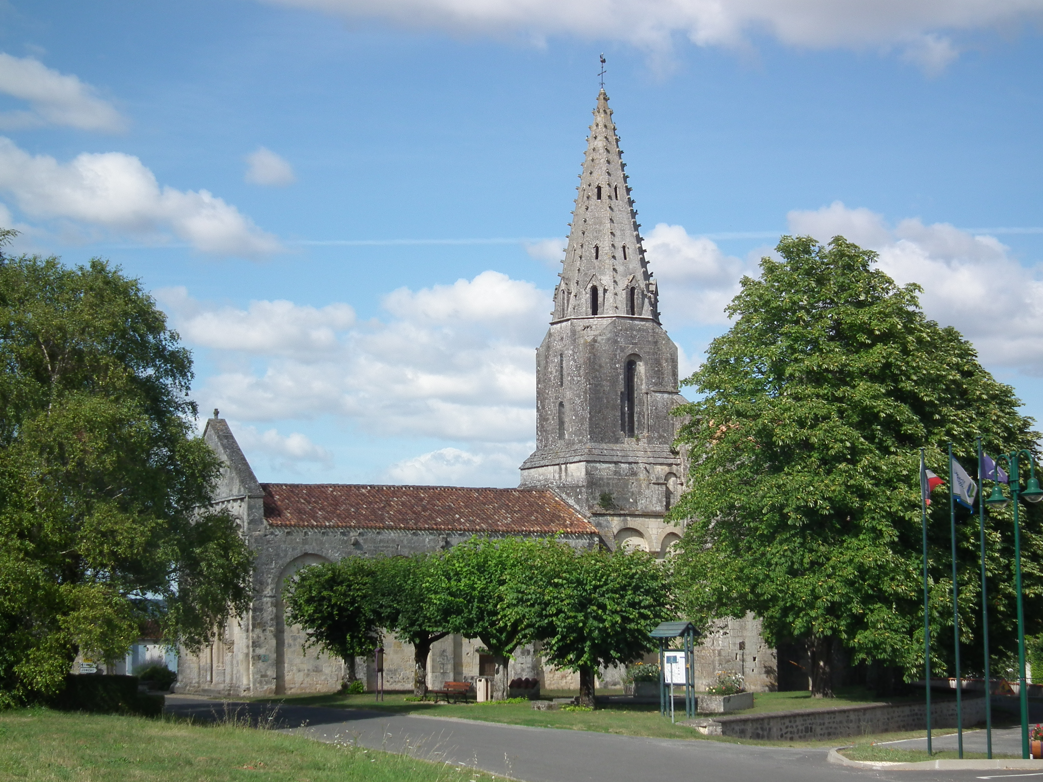 L'église d'Avy, Charente-Maritime